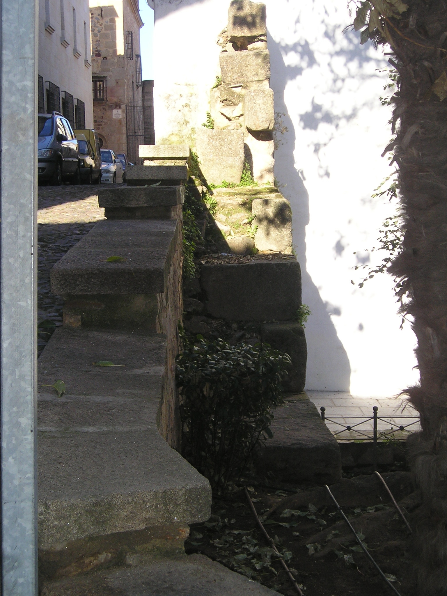 Vista de los restos de la muralla romana bajoimperial de Cáceres en la derruida Puerta de Coria, apreciándose los sillares reutilizados de construcciones altoimperiales